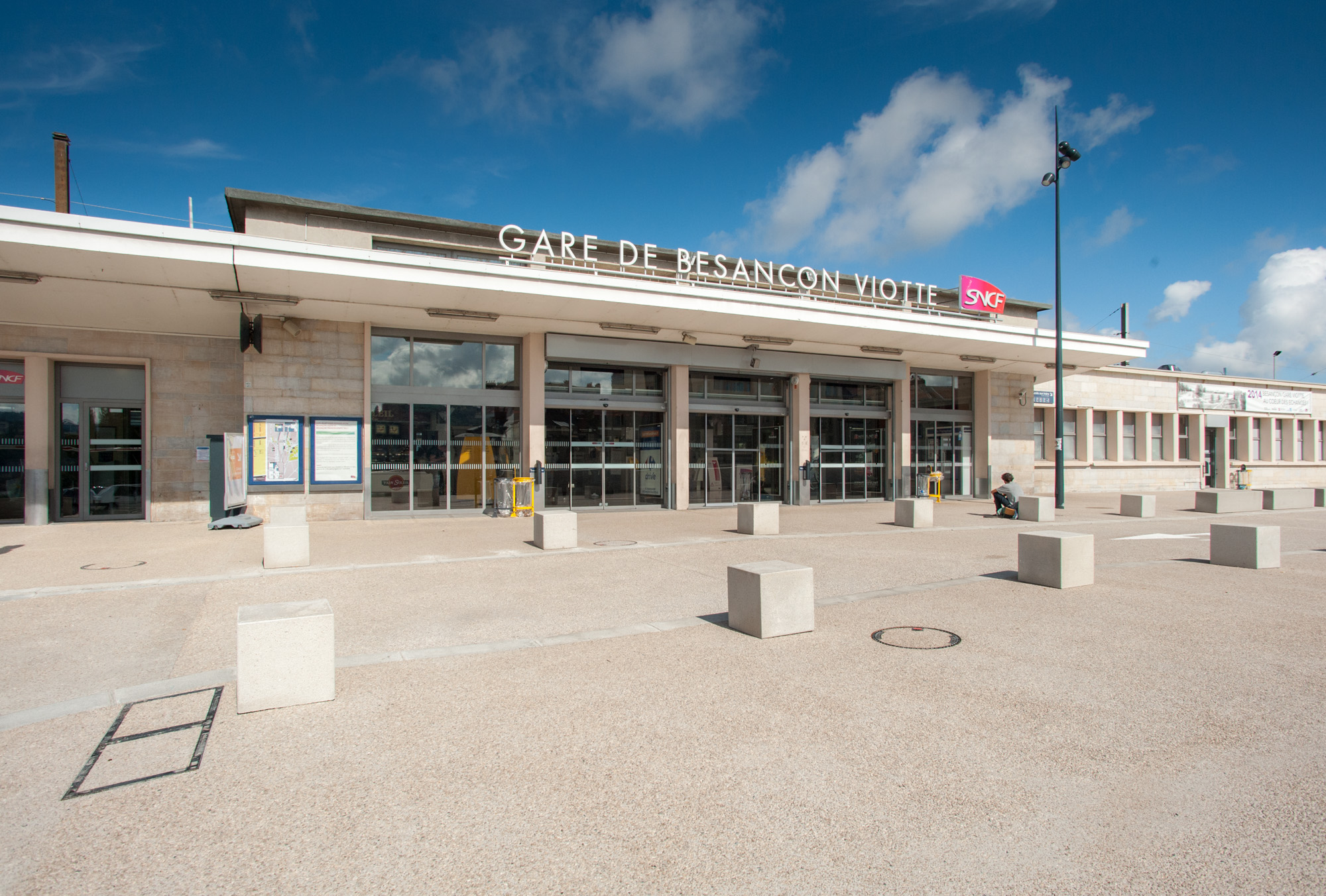 Bâtiment voyageurs de la gare de Besançon-Viotte.